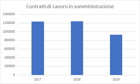 Contratti di lavoro in somministrazione. Serie storica 2017-2019. Fonte: serie storica INPS